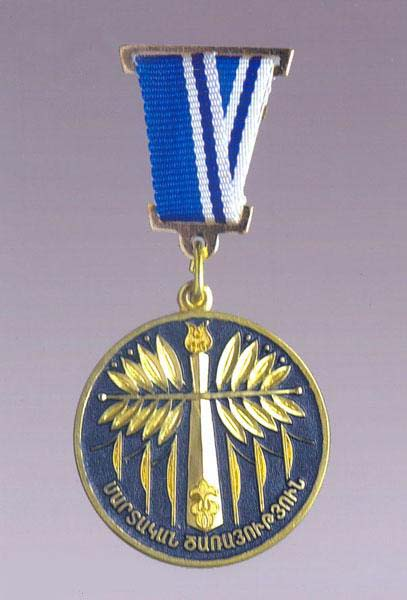 Հայաստանի Հանրապետության Մարտական ծառայության մեդալ